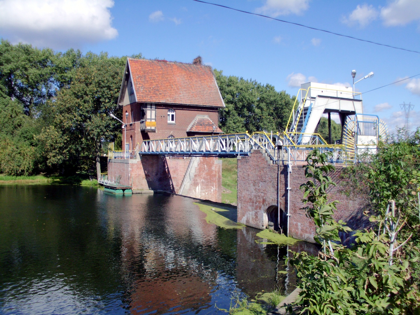 zespół Kanału Bydgoskiego (Starego i Nowego), 1773-1774, 1908-1815: szlak wodny z urządzeniami hydrotechnicznymi (9 śluz, 1 jaz) 6 budynków maszynowni 2 budynki sterowni 3 budynki obsługi 5 budynków mieszkalnych („dom śluzowego”) Bydgoszcz - Kanał Bydgoski (zabytek nr rejestr. A/900/1-27)